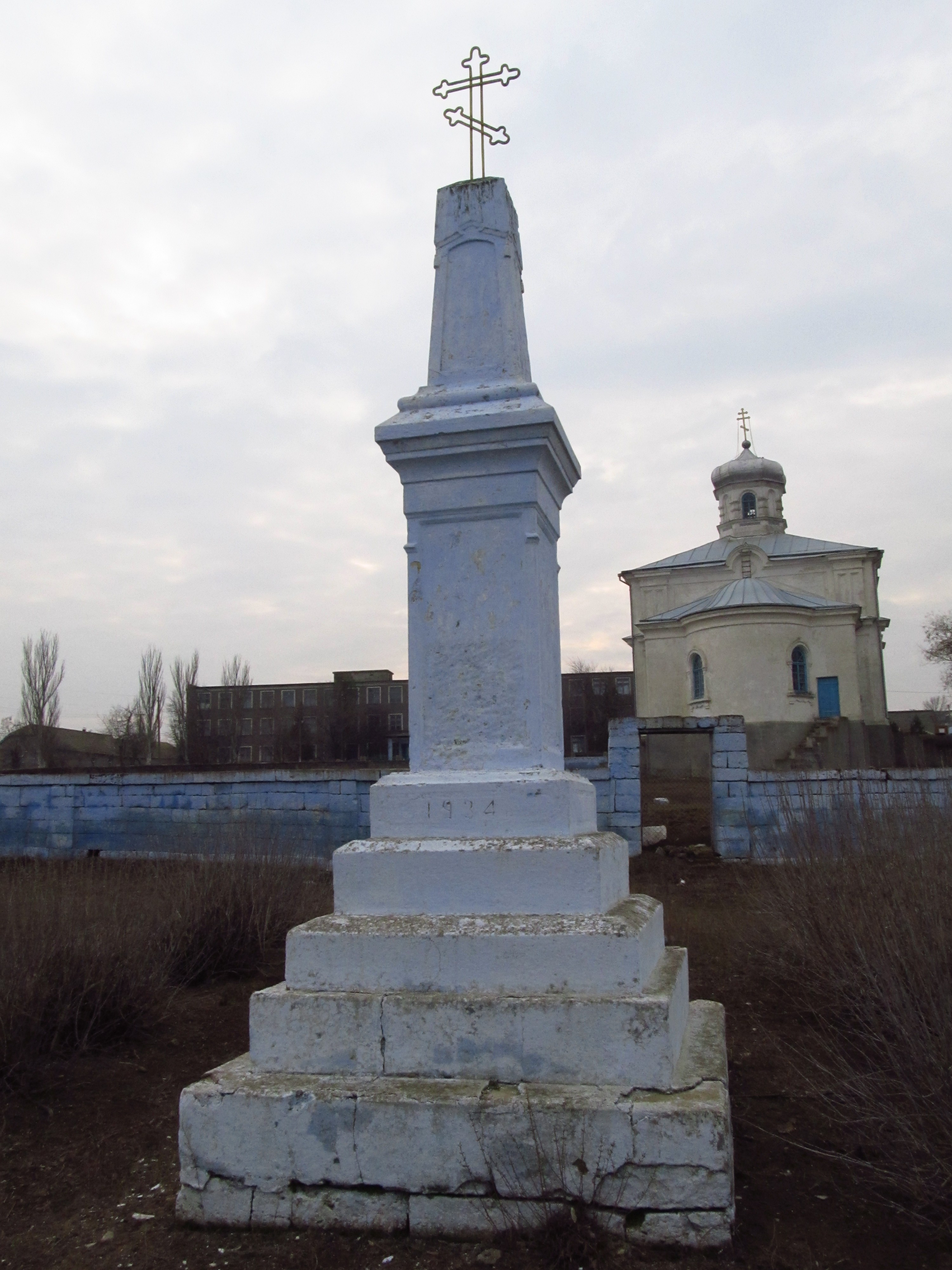 Пам’ятник воїнам-односельцям, загиблим в роки І світової війни, с. Острівне